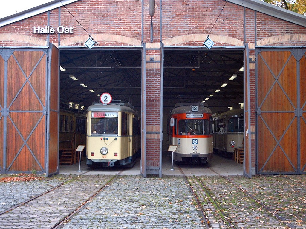 Schwanheim tramway museum (Frankfurt am Main), November 2, 2003. Photo by myself, GNU-FDL. Schwanheimer Verkehrsmuseum (Frankfurt am Main), 2. November 2003. Selbst fotografiert, GNU-FDL.